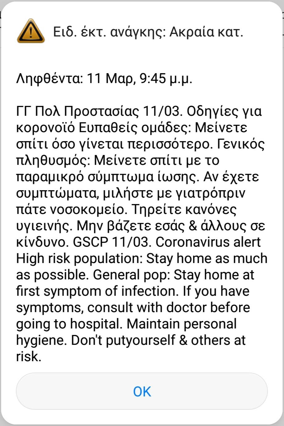 Μήνυμα από Γενική Γραμματεία Πολιτικής Προστασίας για την πανδημία κορονοϊού στις 11 Μαρτίου 2020.